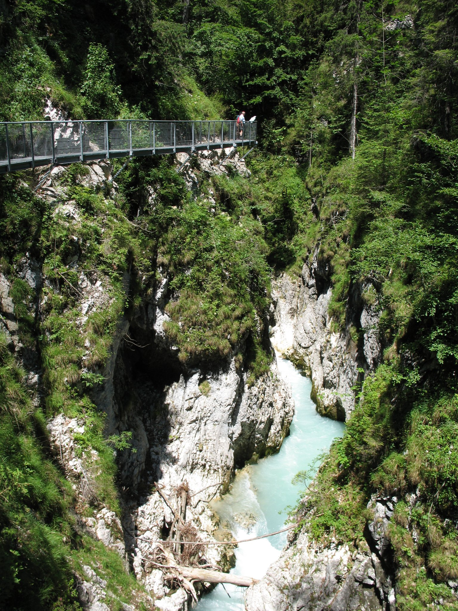 Leutaschklamm